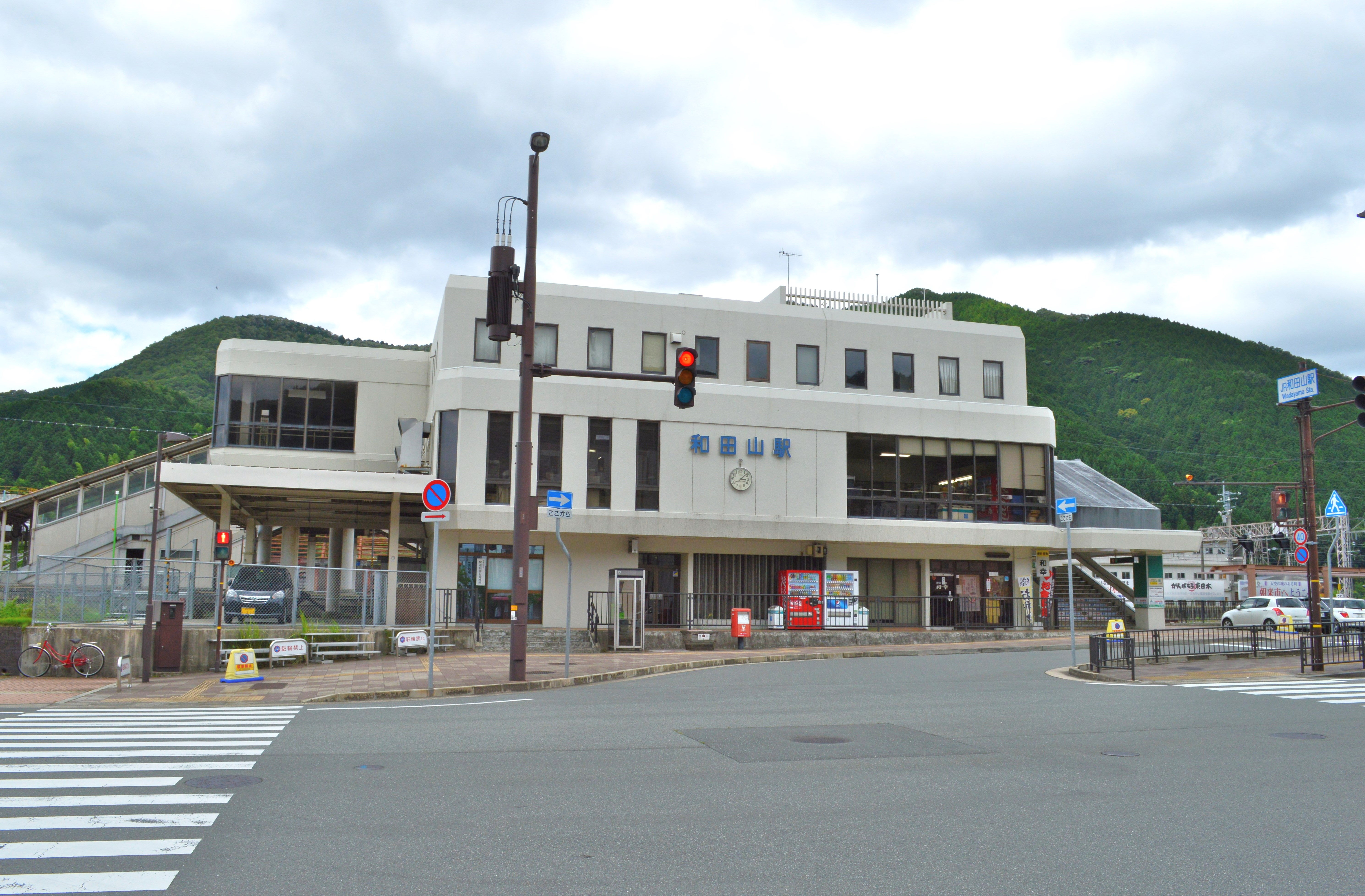 和田山駅 駅舎